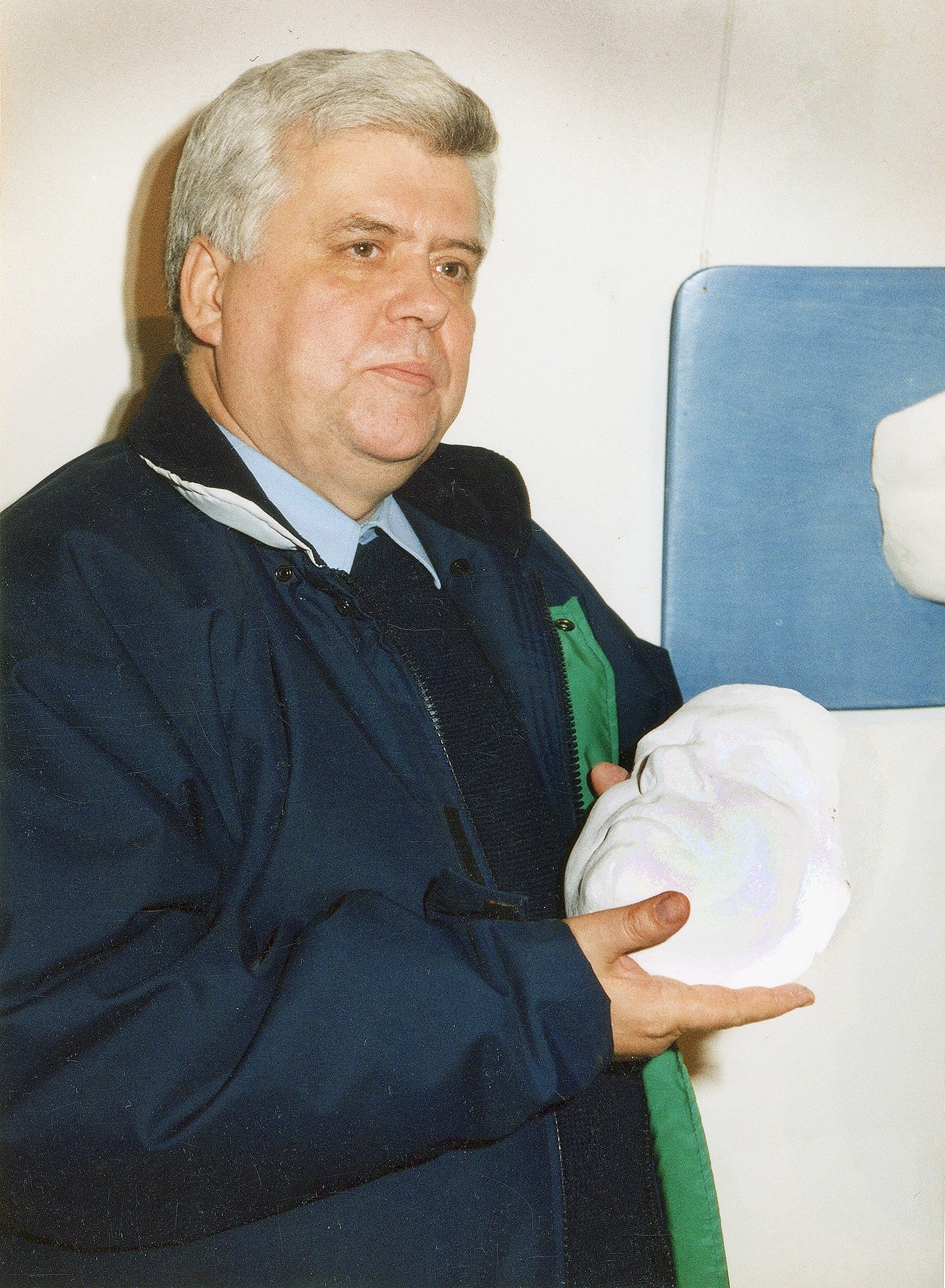 Kalle Mihkels, meediategelane skulptor Rait Pärg'i näituse avamisel 99.